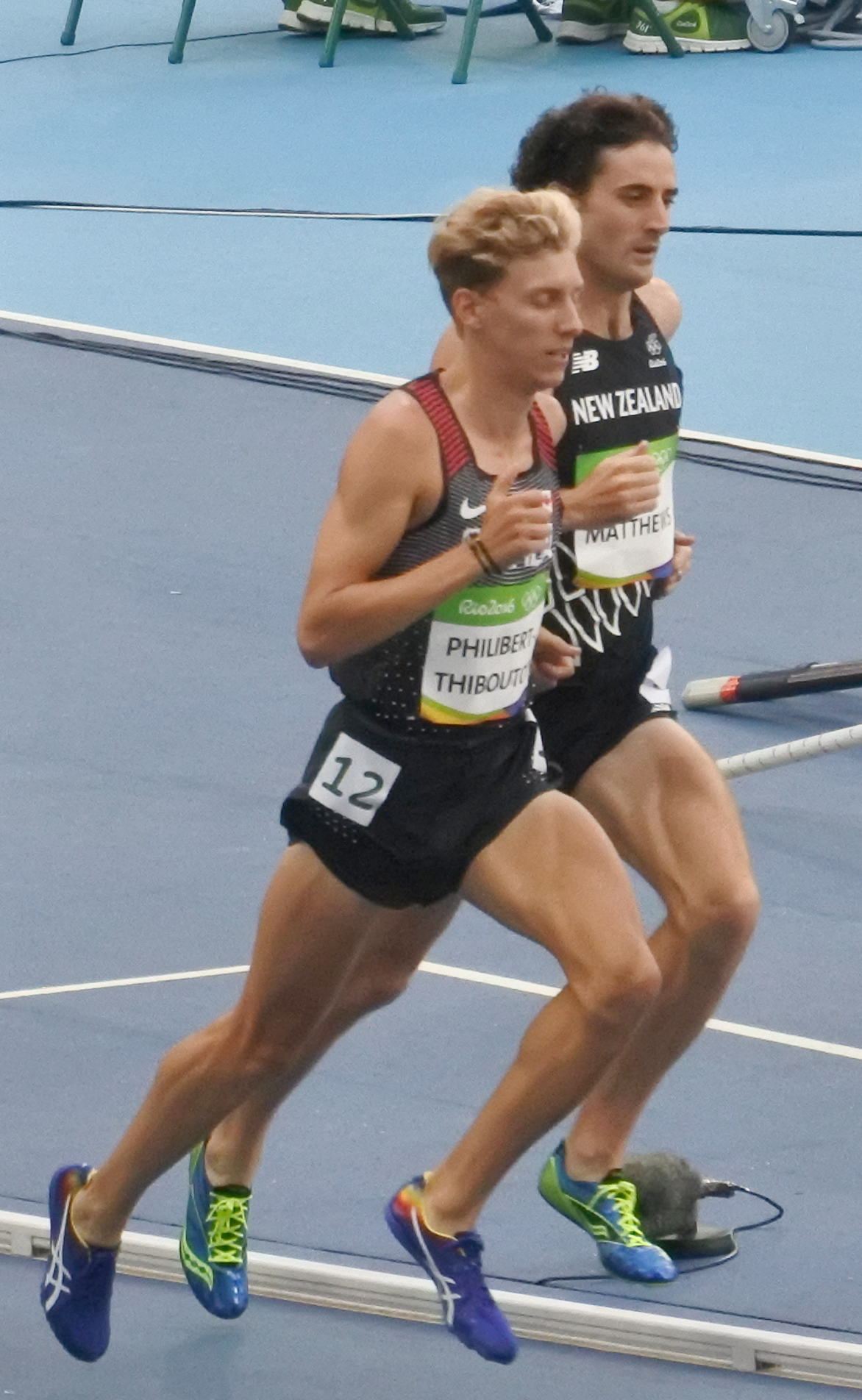 Rio 2016 - Eliminatórias 1500m Masculino